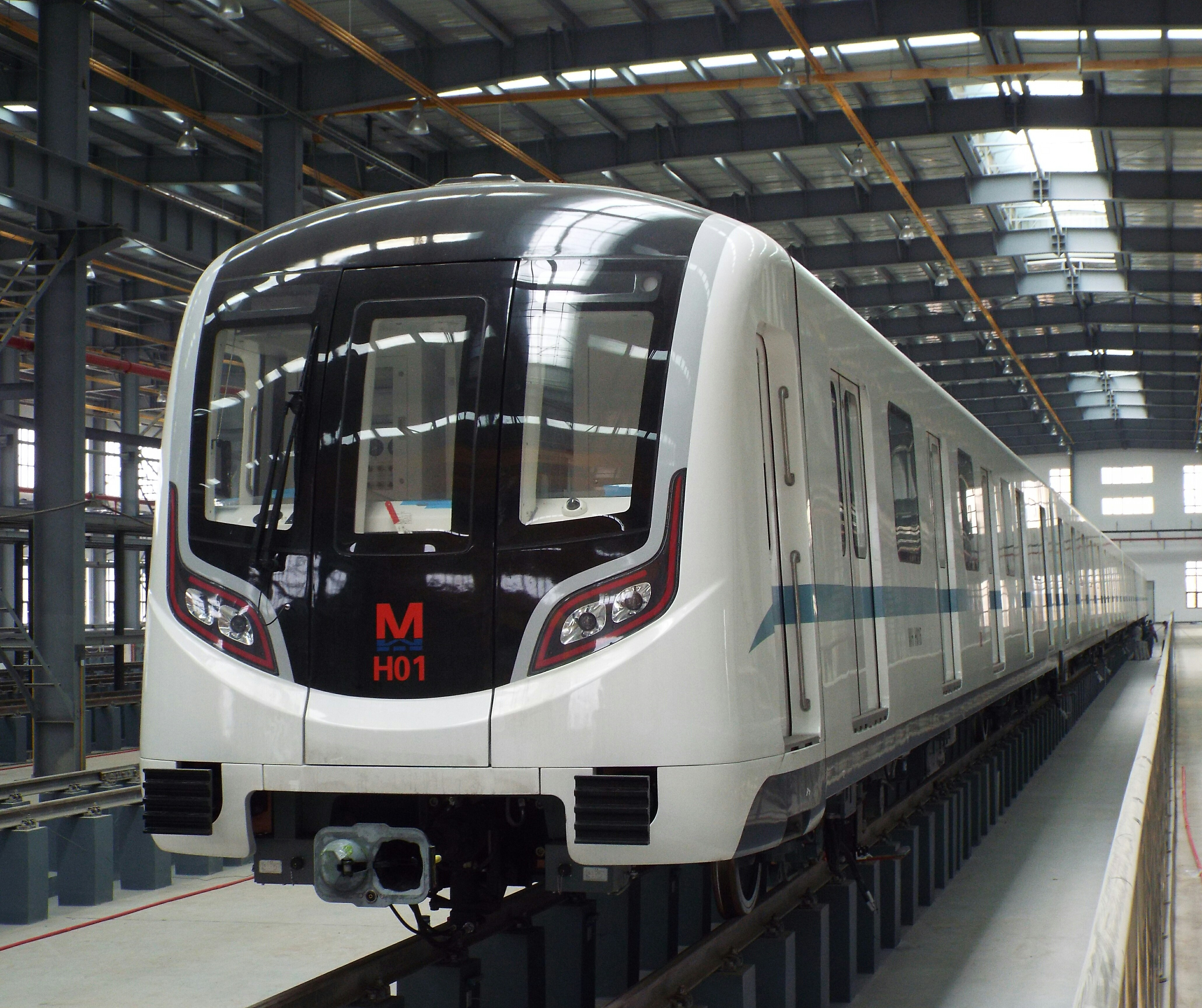 武汉地铁8号线列车，位于三金潭车辆段。